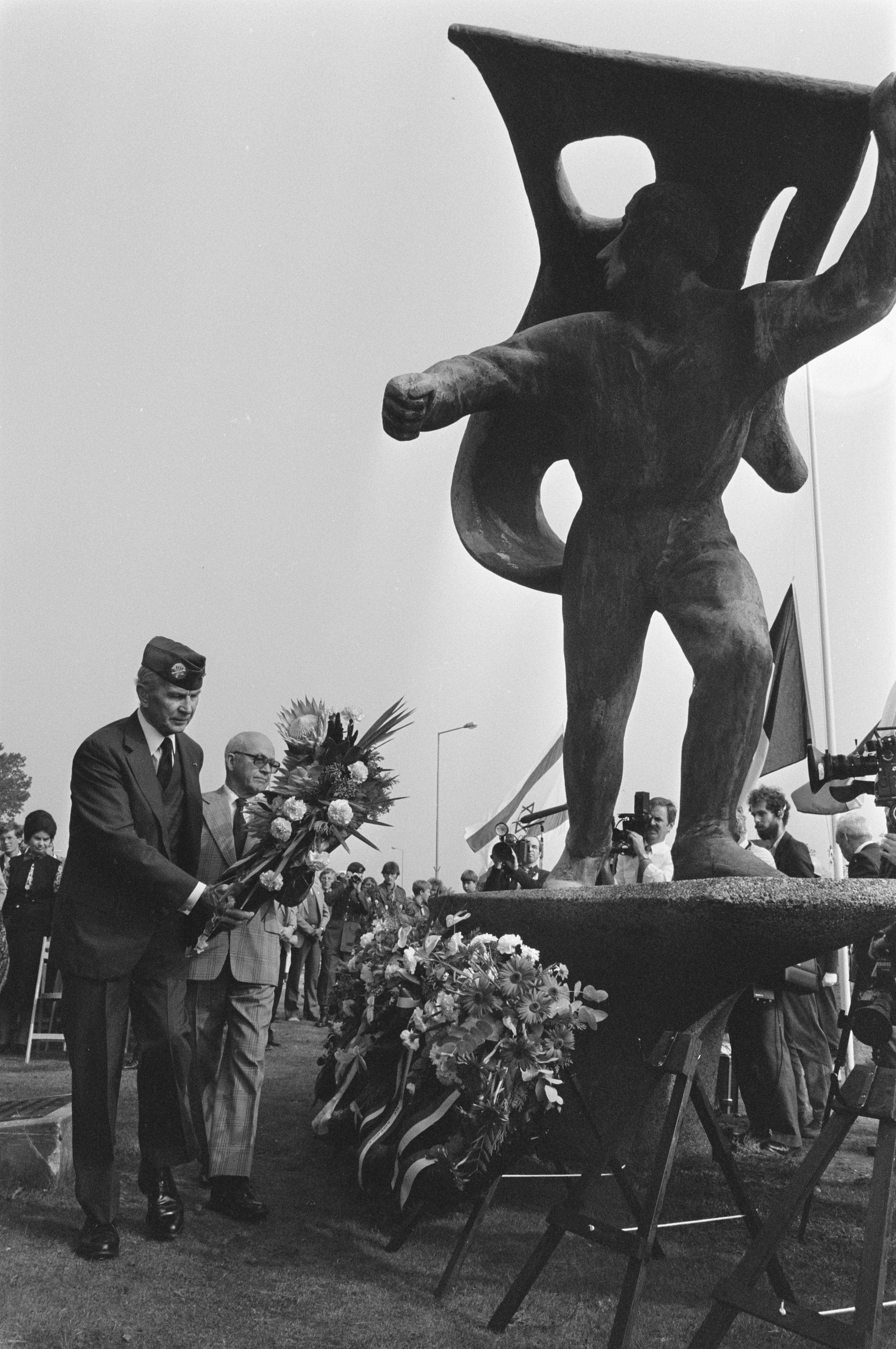 Collectie / Archief : Fotocollectie Anefo Reportage / Serie : [ onbekend ] Beschrijving : Opening Bevrijdingsmuseum in Nijmegen en herdenking Operatie Market Garden ; Amerikaanse veteranen toegejuicht Datum : 17 september 1984 Locatie : Nijmegen Trefwoorden : Openingen, herdenkingen, musea Instellingsnaam : Market Garden Fotograaf : Croes, Rob C. / Anefo Auteursrechthebbende : Nationaal Archief Materiaalsoort : Negatief (zwart/wit) Nummer archiefinventaris : bekijk toegang 2.24.01.05 Bestanddeelnummer : 933-0806